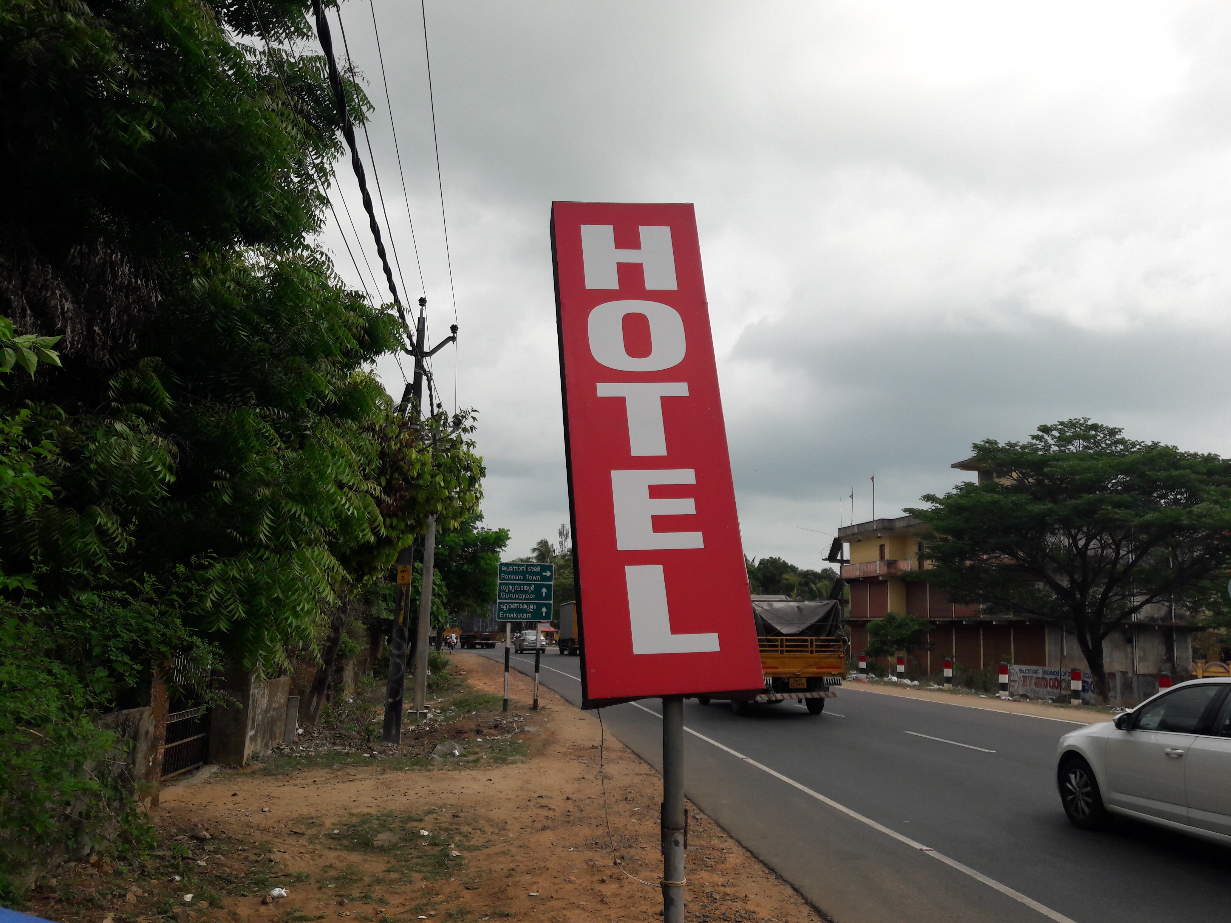 മലപ്പുറം ജില്ലയിലെ പൊന്നാനി എം ഈ എസ് കോളേജ് ഗ്രൗണ്ടിന്റെ അടുത്ത് നാഷണൽ ഹൈവേയ്ക്ക് അരികത്തുള്ള ഒരു ഹോട്ടൽ.